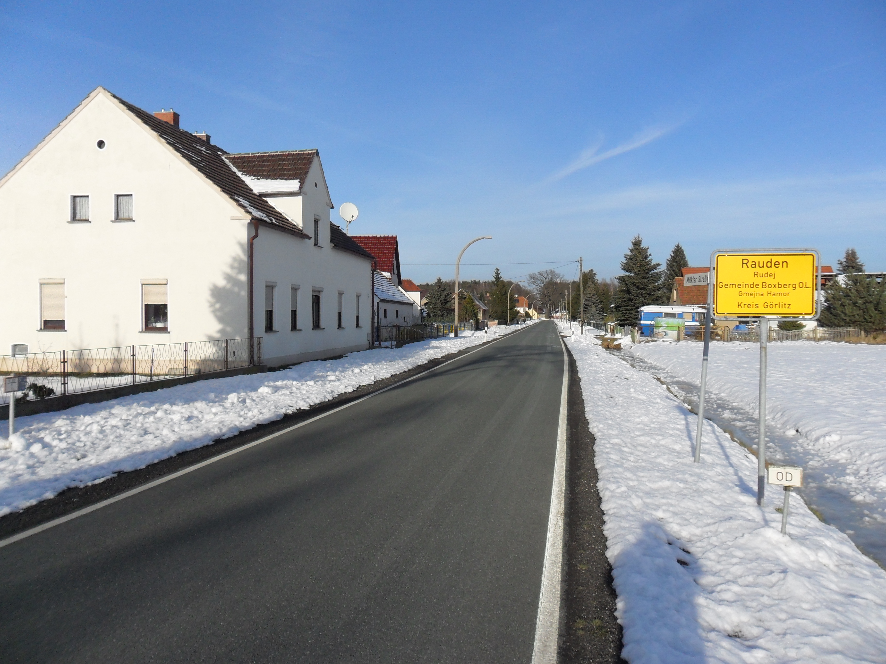 Rauden - ein Straßendorf in der Lausitz Hornjoserbsce: Rudej – dróhowc we Łužicy